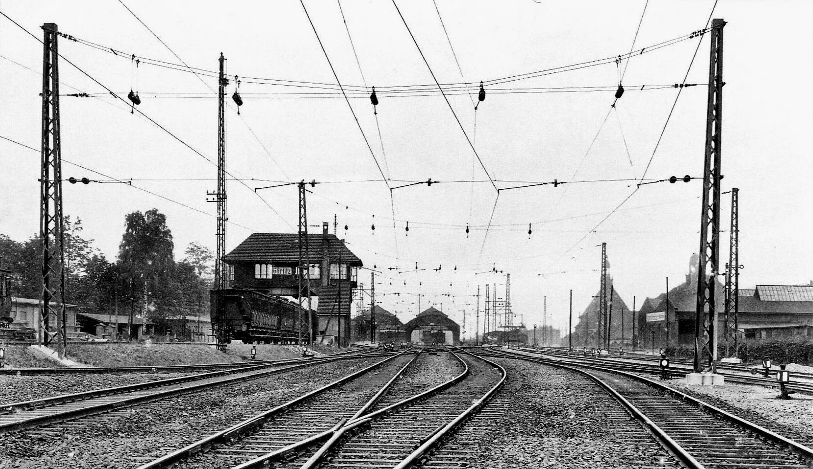 Die Aufnahme zeigt den Bahnhof Görlitz nach der Elektrifizierung im Jahr 1923.